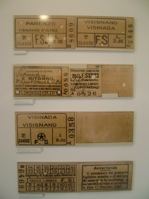 Karte "Parenzane" slikane u muzeju u Livadama.